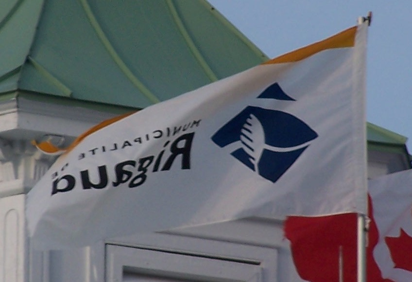 Drapeau de Rigaud